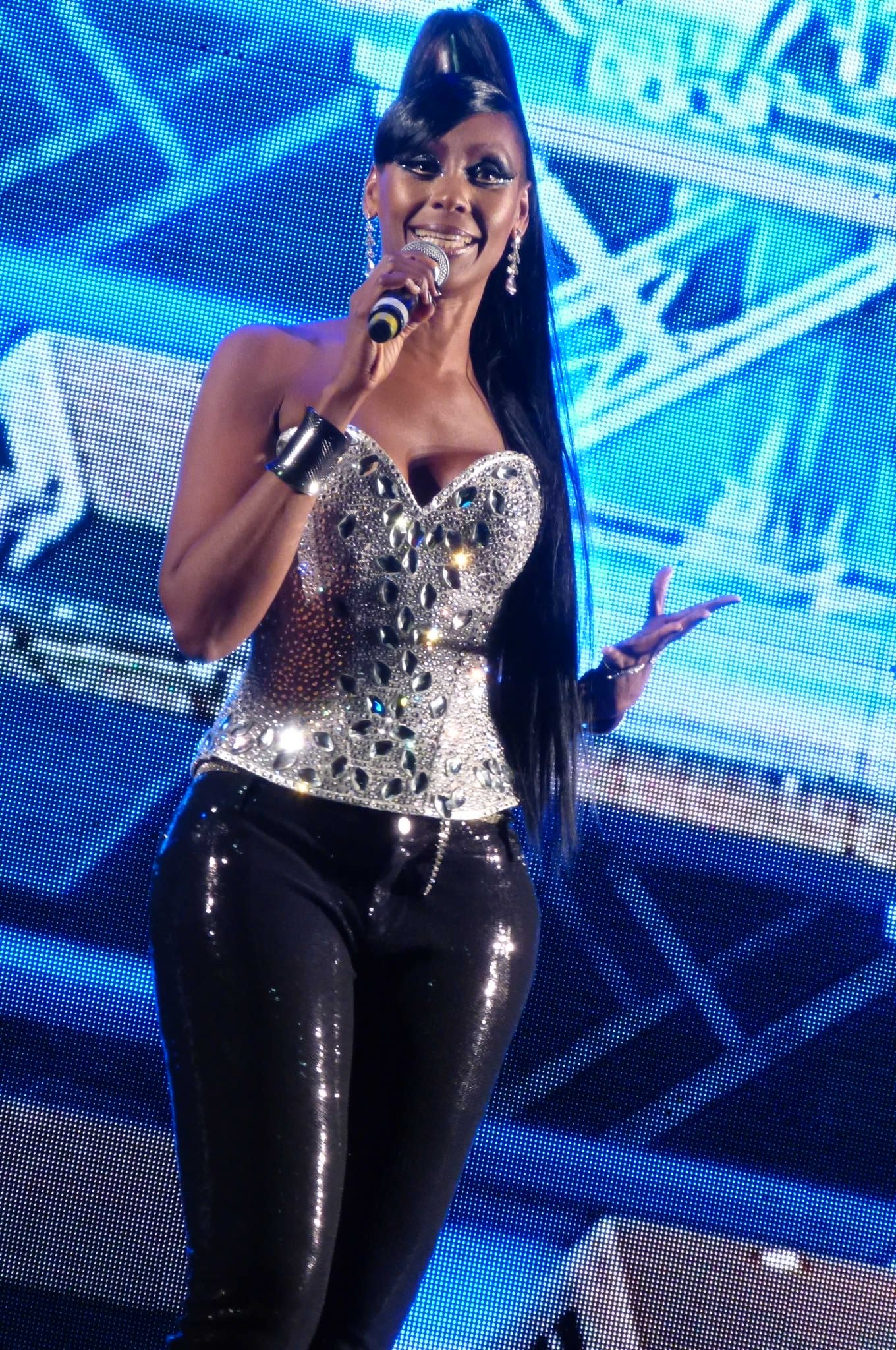 Vale do Anhangabaú - 30/05/2013